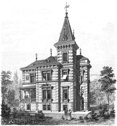 Hirtenberg (an der Triesting), Villa des Stadtbaumeisters Josef Tischler; später: Keller’sche Villa am Bach